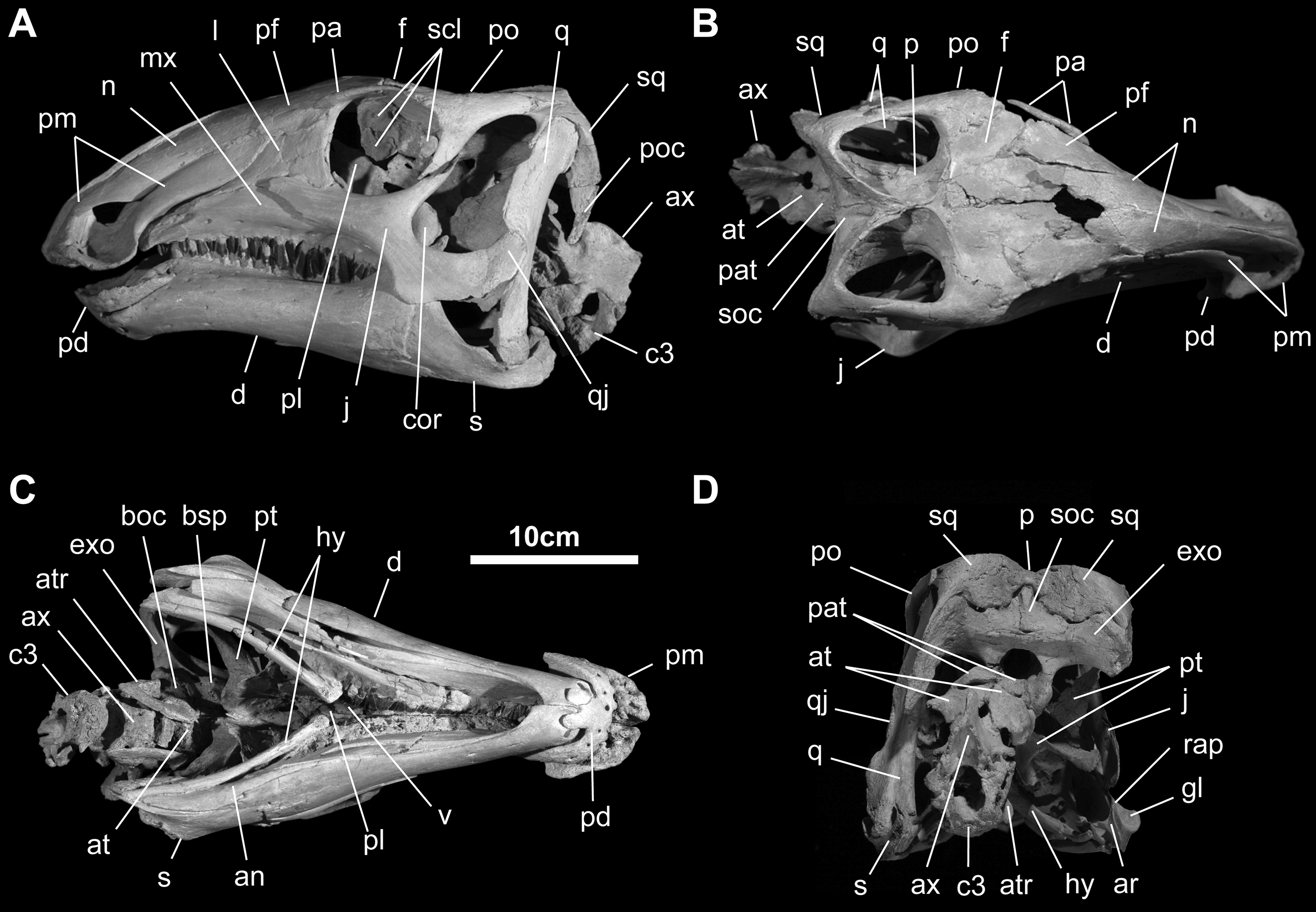 Skull and mandible of Gobihadros mongoliensis. Skull and mandible (MPC-D100/763) in left lateral (A), dorsal (B), ventral (C), and posterior (D) views. Abbreviations: an, angular; ar, articular; at, atlas; atr, atlantal rib; ax, axis; boc, basioccipital; bsp, basisphenoid; cop, coronoid process; c3, 3rd cervical vertebra; d, dentary; exo, exoccipital; f, frontal; gl, glenoid for the lateral quadrate condyle; hy, hyoid; j, jugal; l, lacrimal; mx, maxilla; n, nasal; p, parietal; pa, palpebral; pat, proatlas; pd, predentary; pf, prefrontal; pl, palatine; pm, premaxilla; po, postorbital; poc, paroccipital process; pt, pterygoid; q, quadrate; qj, quadratojugal; rap, retroarticular process; s, surangular; scl, sclerotic ring; soc, supraoccipital; sq, squamosal; v, vomer.